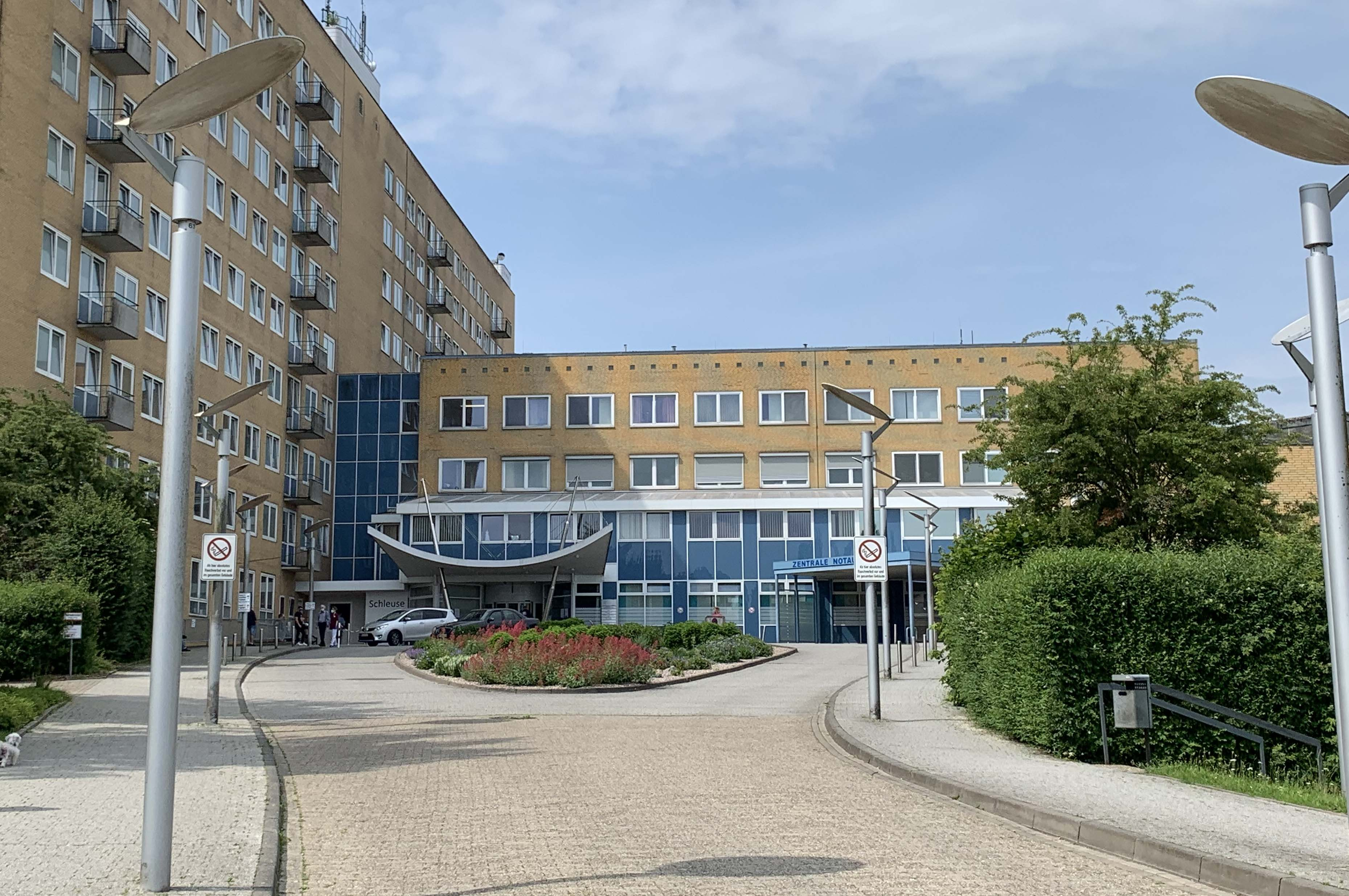 Das Klinikum Wilhelmshaven, Haupteingang mit Zufahrt für Rettungswagen